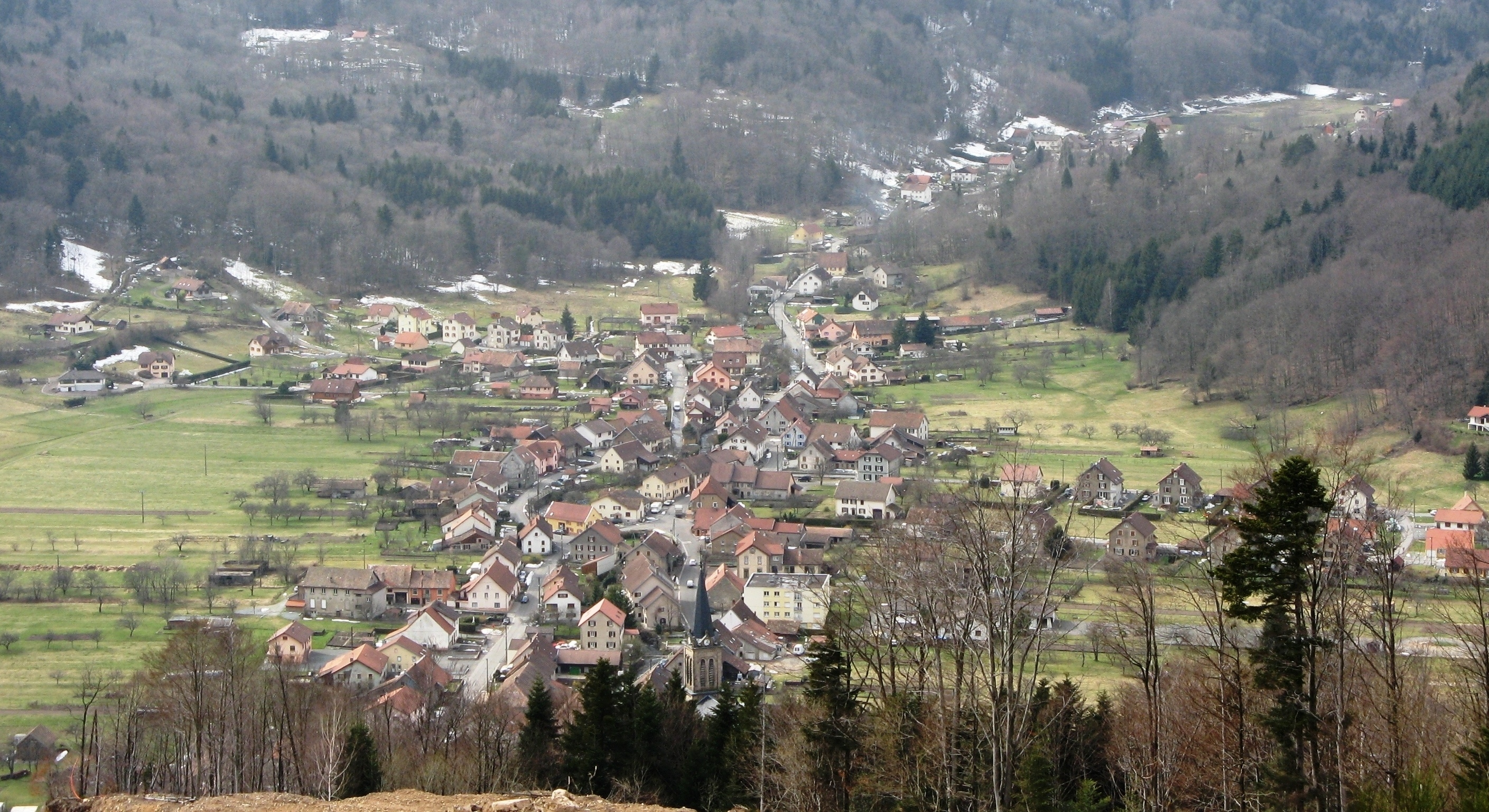 Lepuix-gy